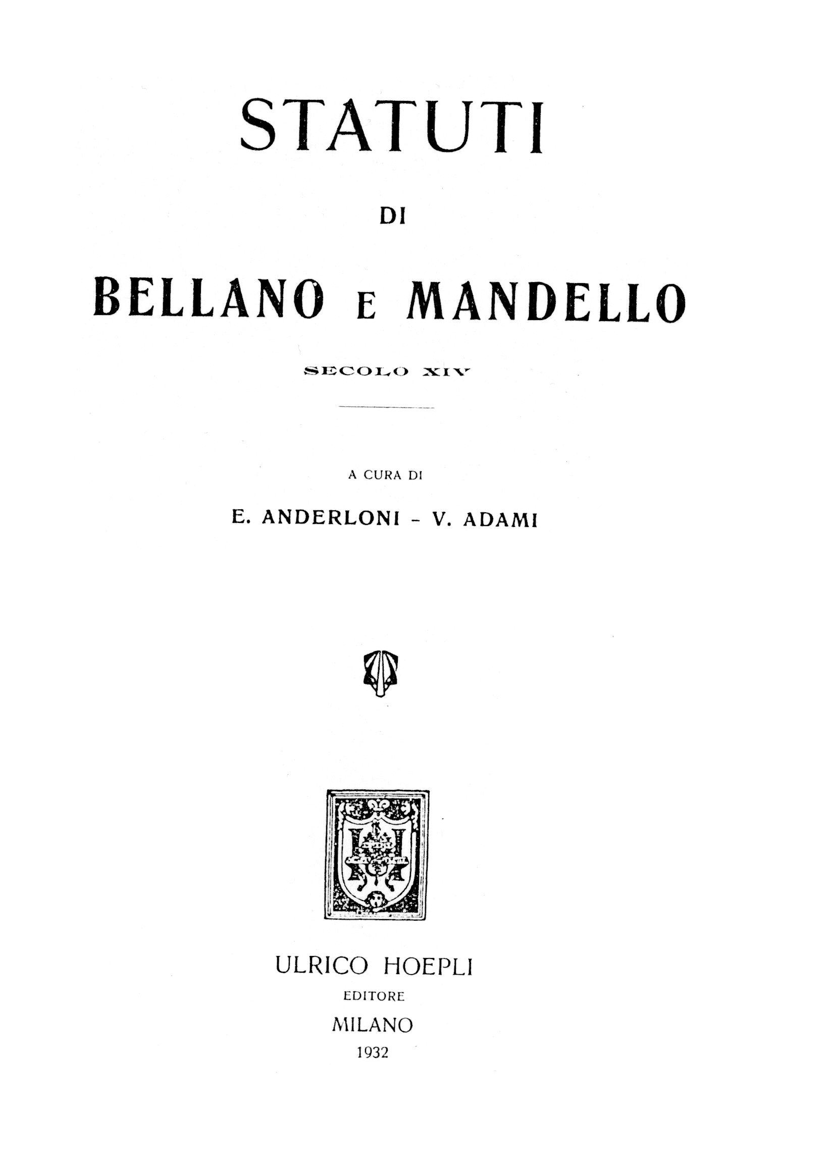 Statuti di Bellano e Mandello, 1932